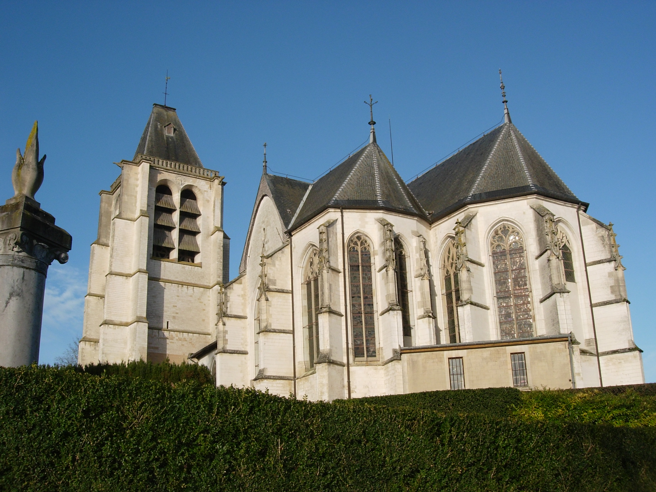 Eglise de Chavanges